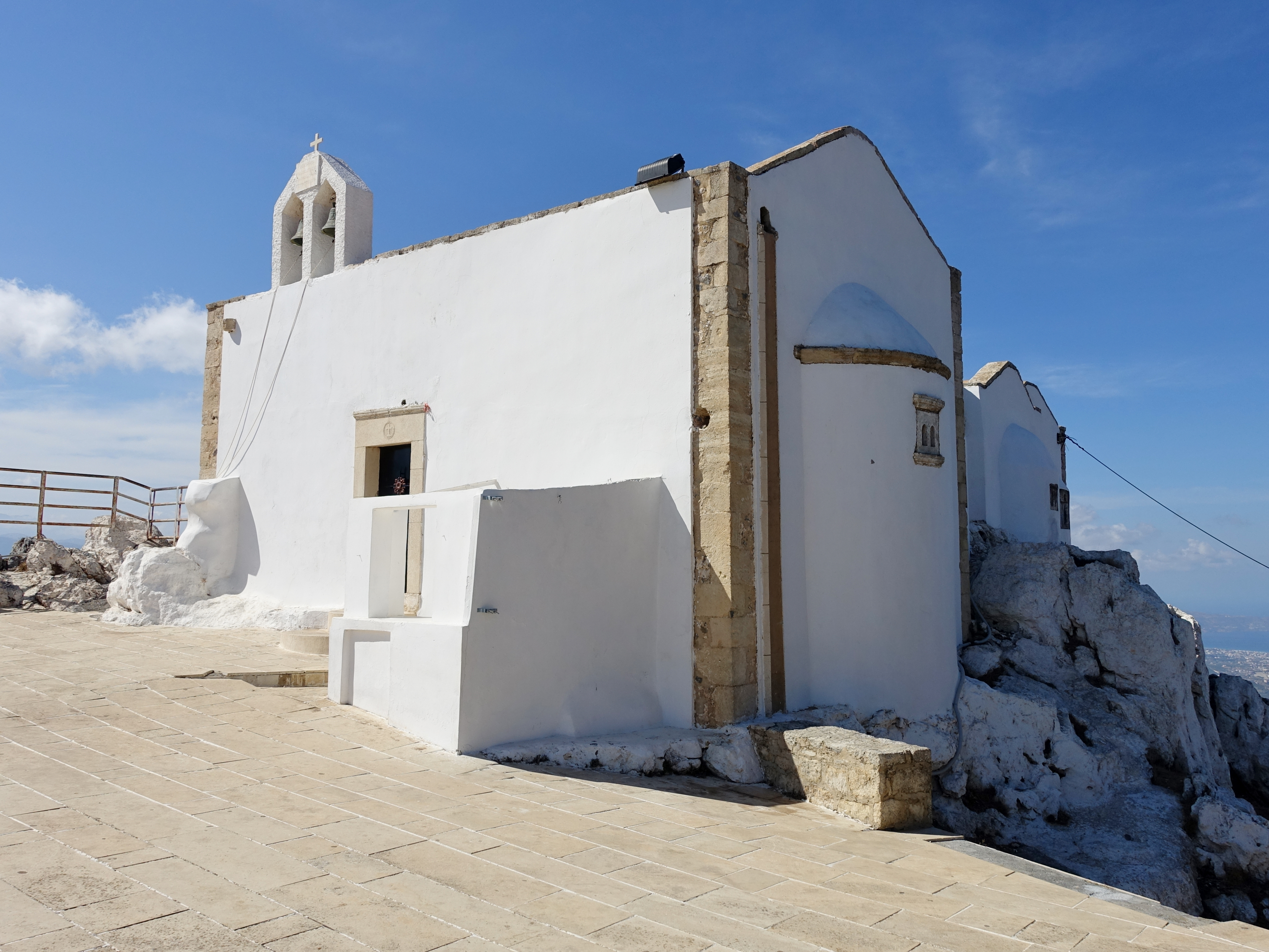 Kirche Afendis Christos (Αφέντης Χριστός) auf dem Höhenzug Giouchtas (Γιούχτας), Kreta, Griechenland